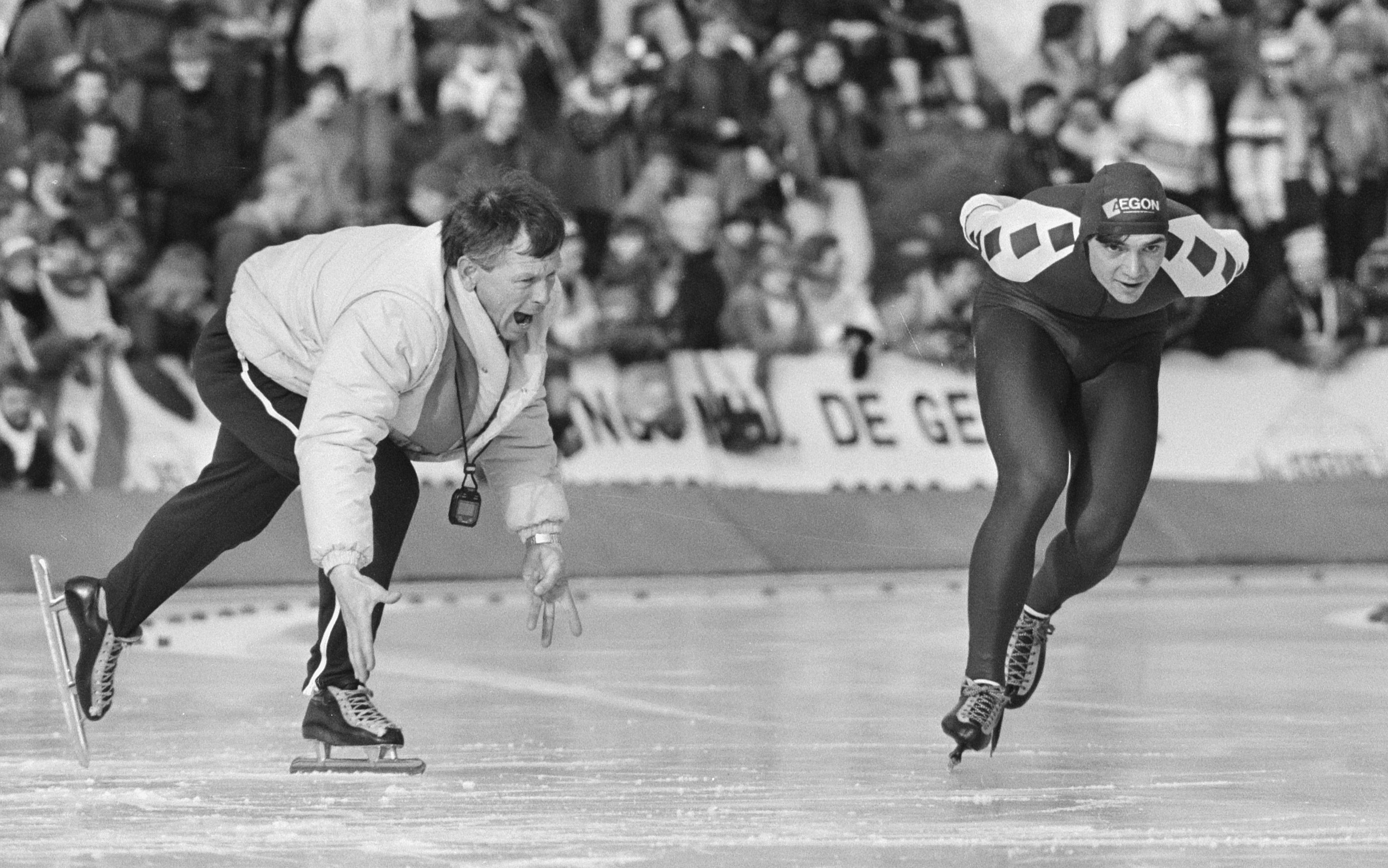 NK schaatsen in Alkmaar, Hein Vergeer met links coach Henk Gemser tijdens de 10 km